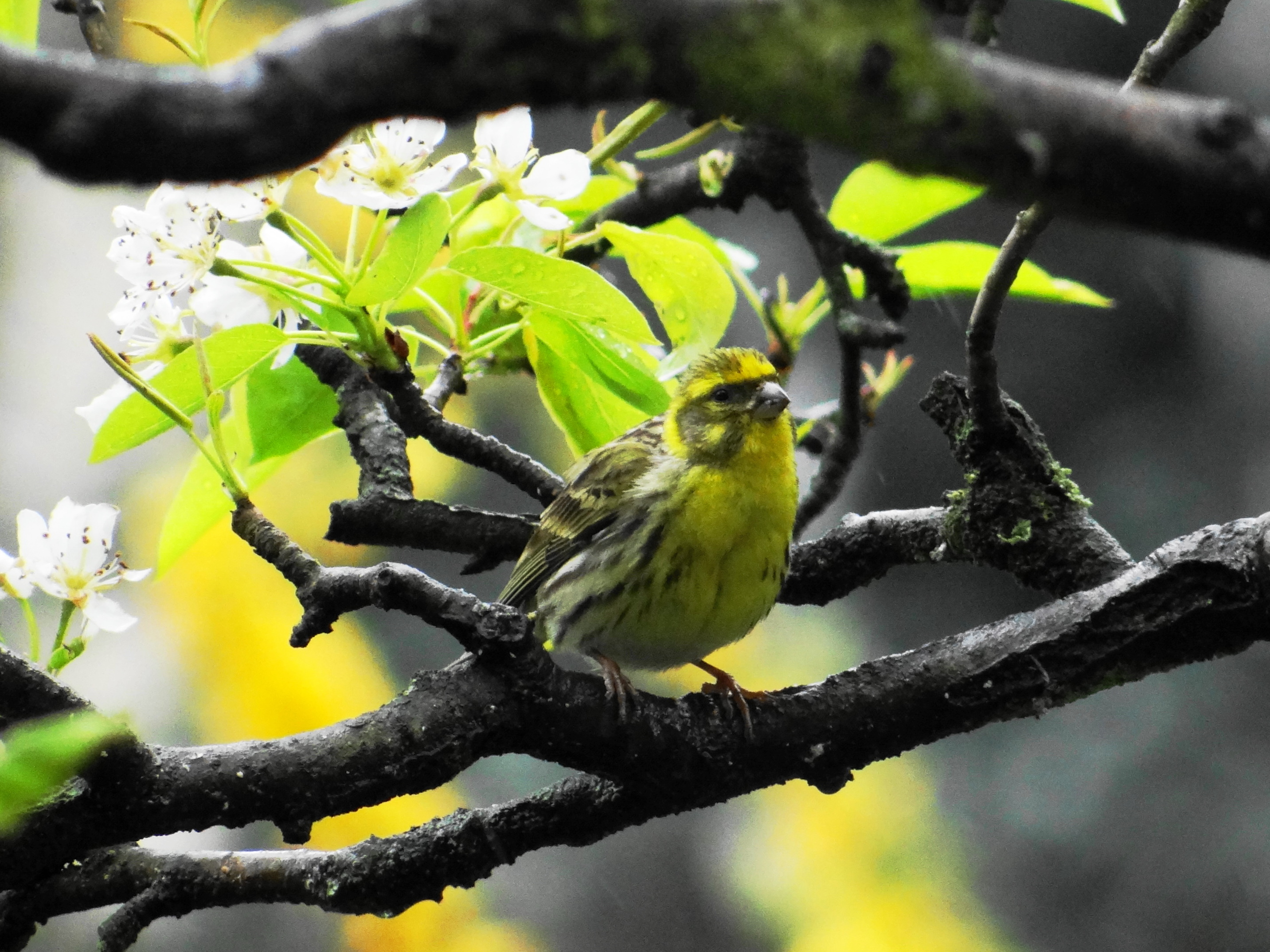 serin cini sous la pluie